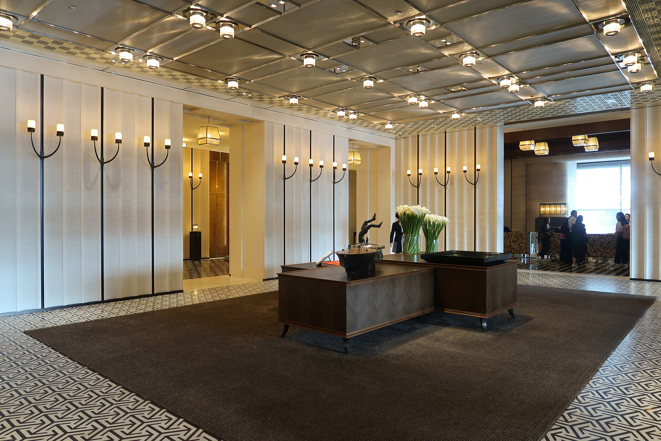 Rosewood Hong Kong Lobby